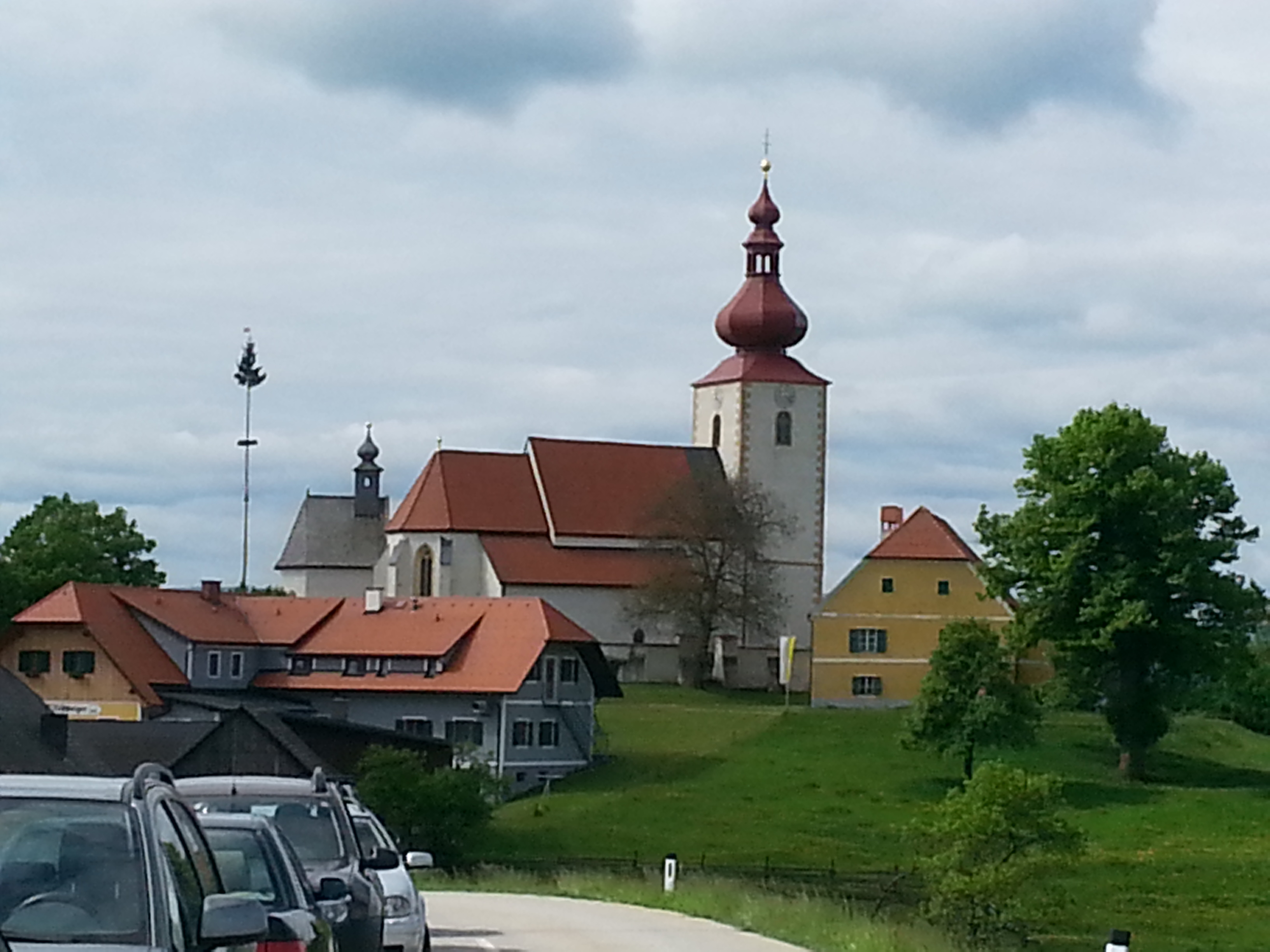 Blick auf die Pfarrkirche (rechts) und die Annakapelle (links) in Gschnaidt, Steiermark. Das gelbe Gebäude rechts ist der denkmalgeschützte Pfarrhof